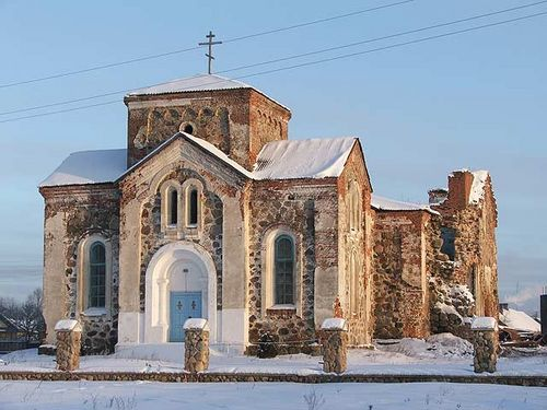 Царква Усіх Святых у Бягомлі